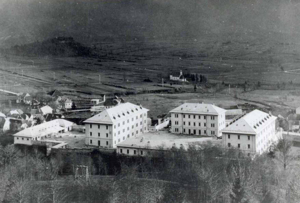 Vojašnica Bovec v tridesetih letih prejšnjega stoletja.